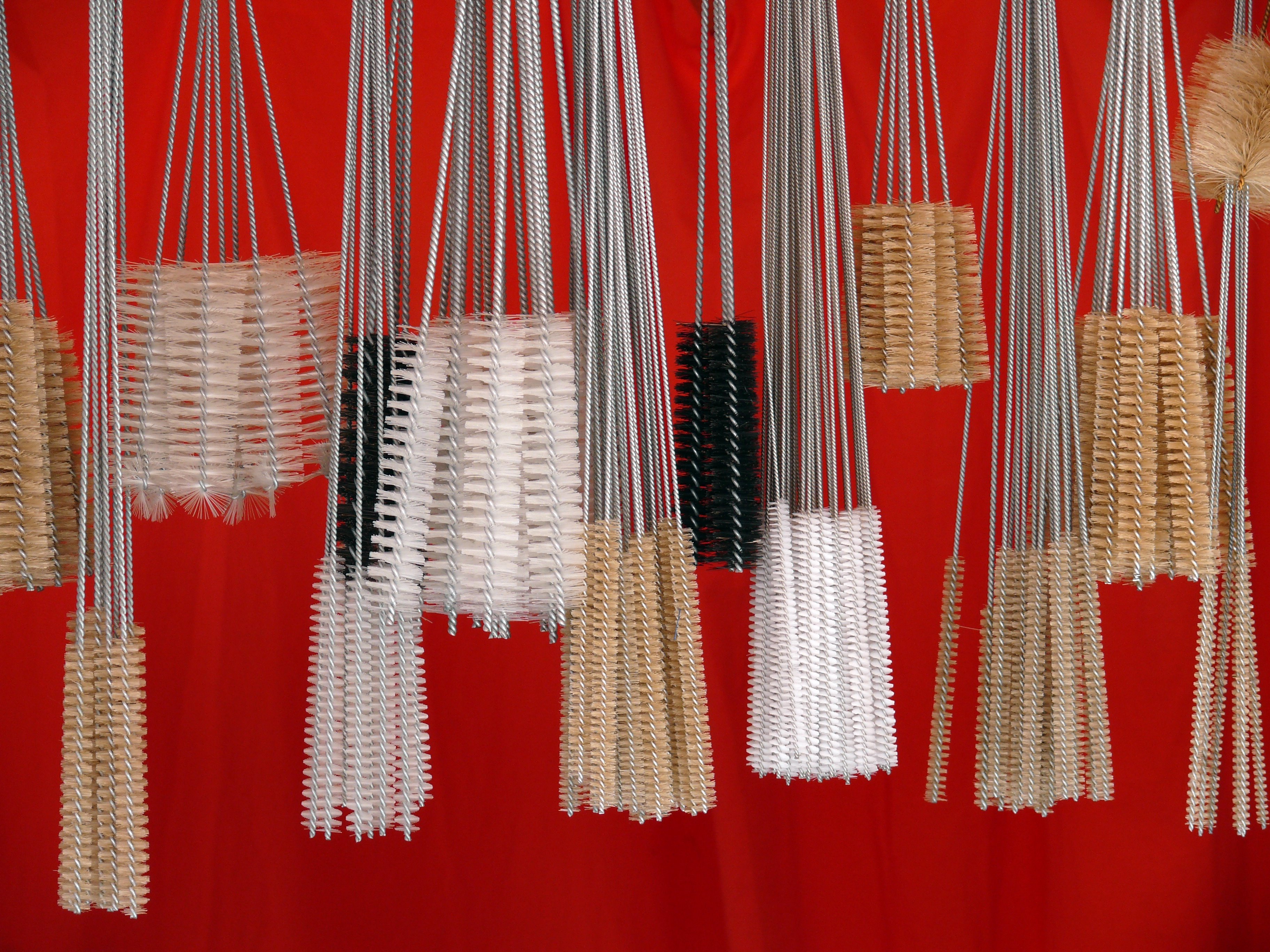 Brushes